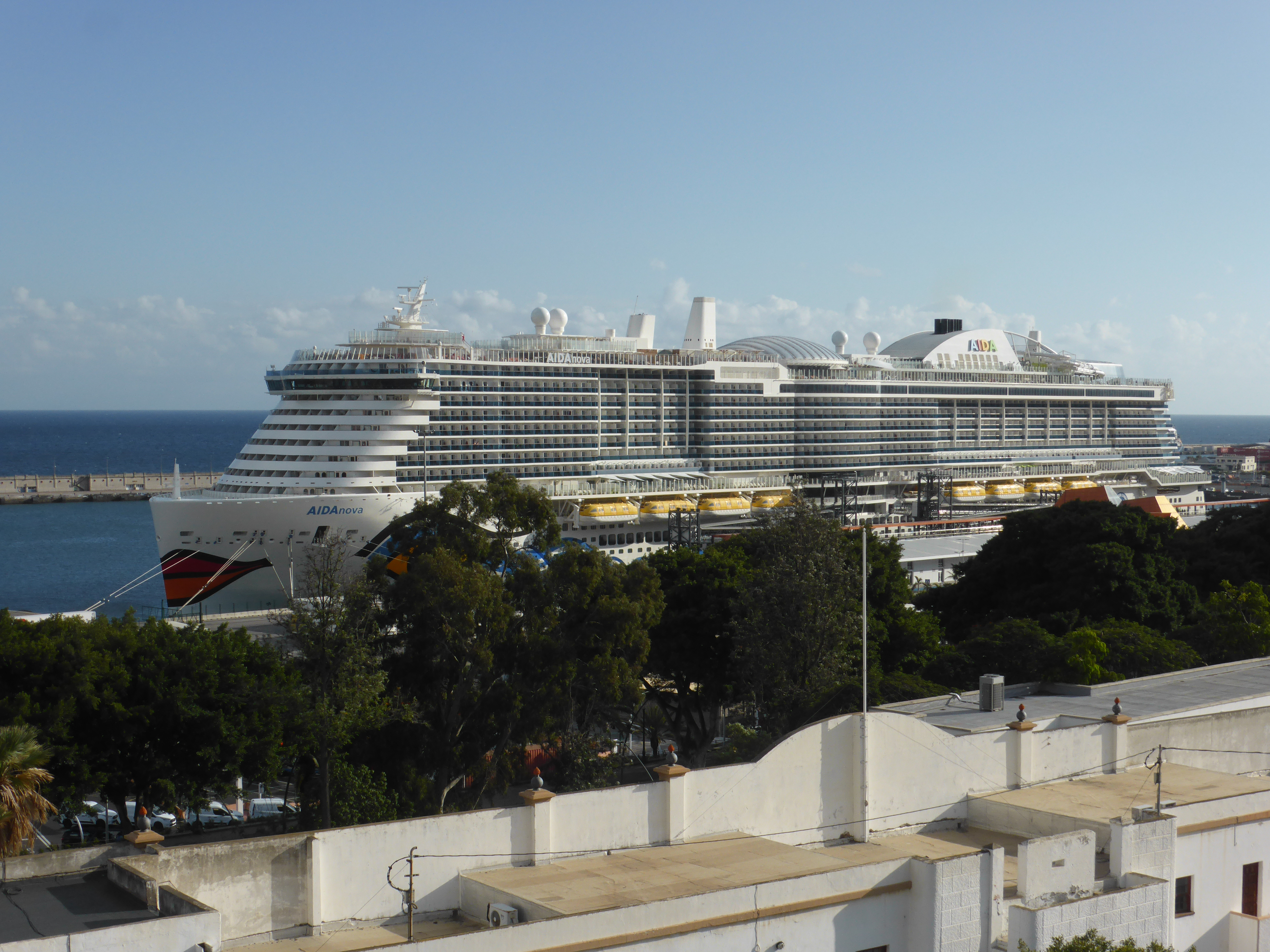 "AIDAnova" (IMO: 9781865), buque de cruceros de turismo, atracado en el puerto de Santa Cruz de Tenerife. Eslora (largo): 337 metros. Utiliza como combustible gas natural licuado (GNL)